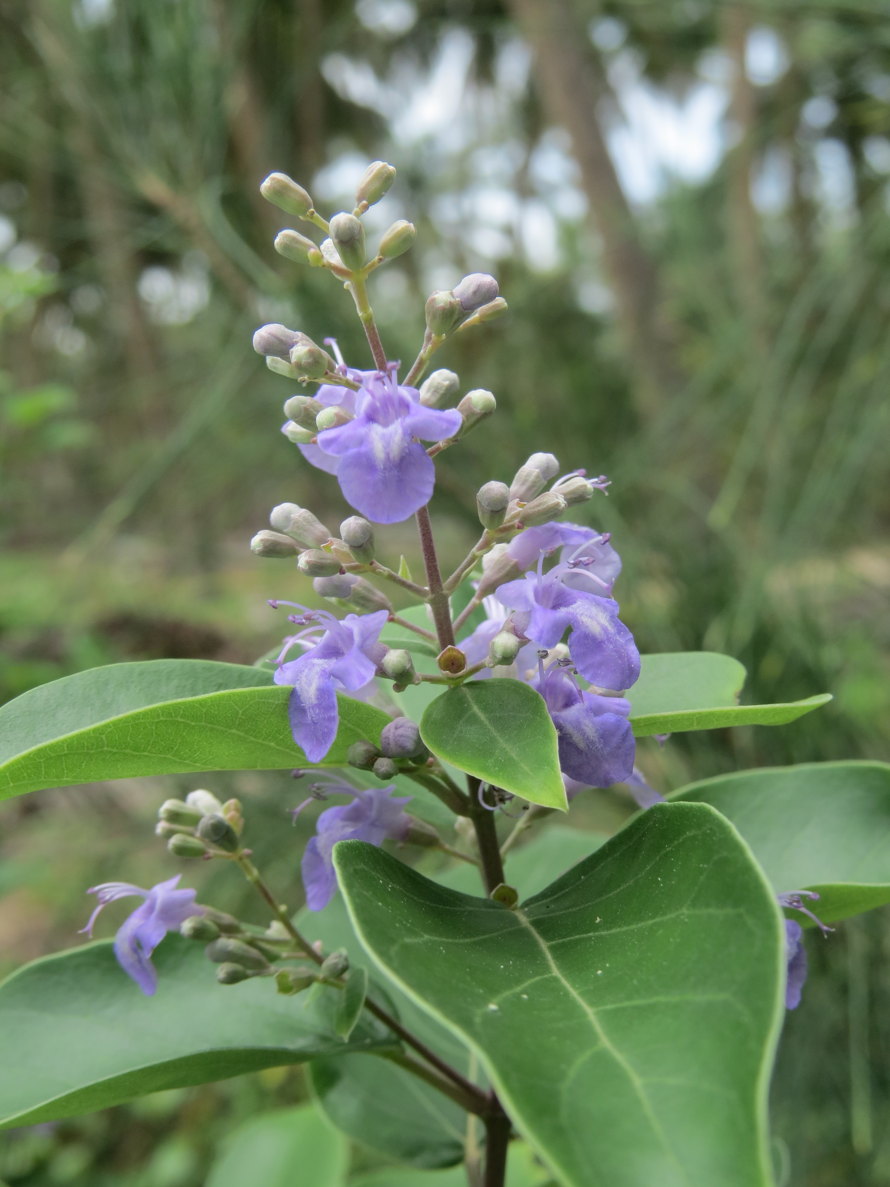 Photos taken at Kavvayi backwaters, Payyannur, Kerala